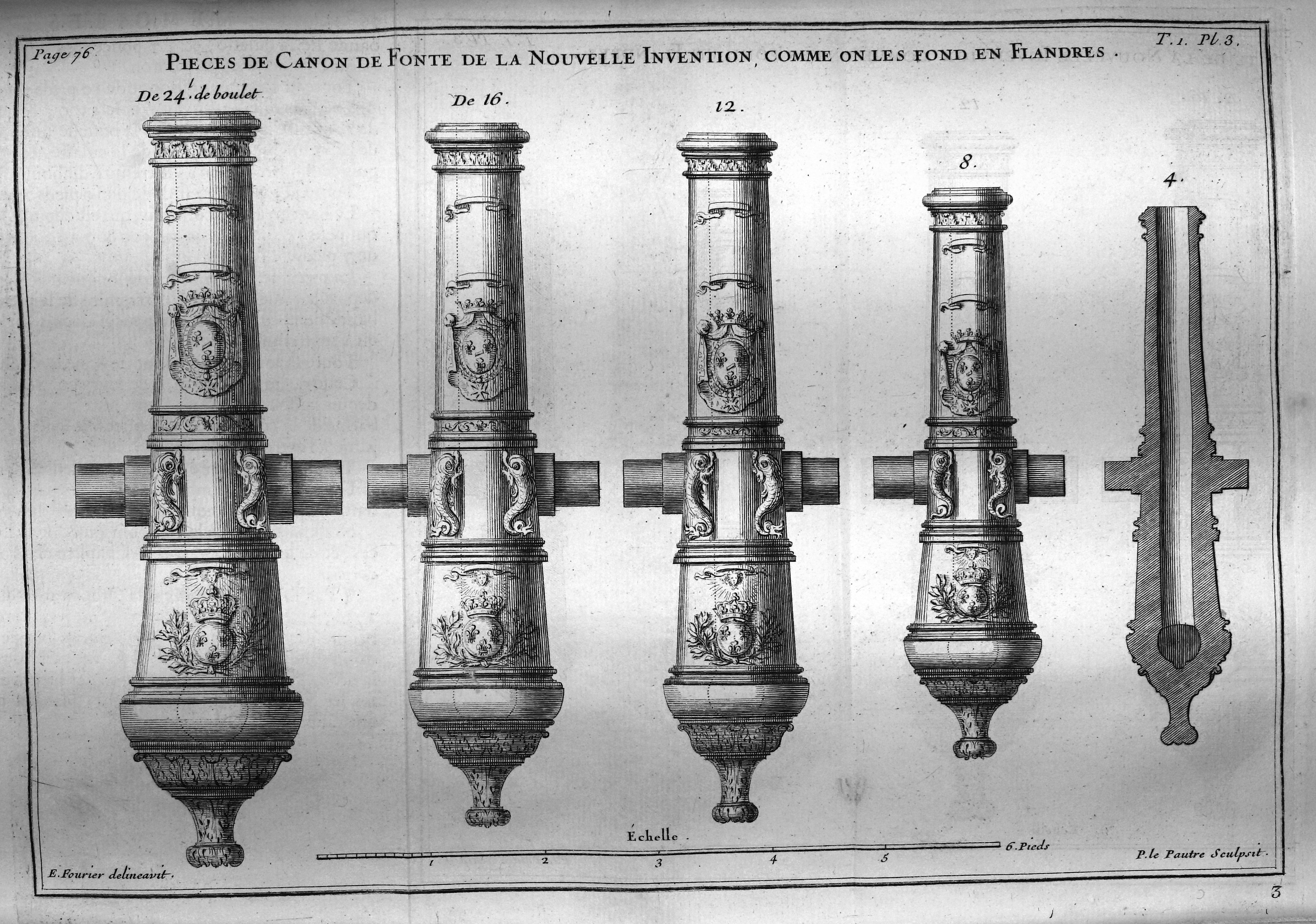 Mémoires d'artillerie, recueillis par M. Surirey de Saint Remy, exemplaire de la B.M. de Reims, troisième édition.